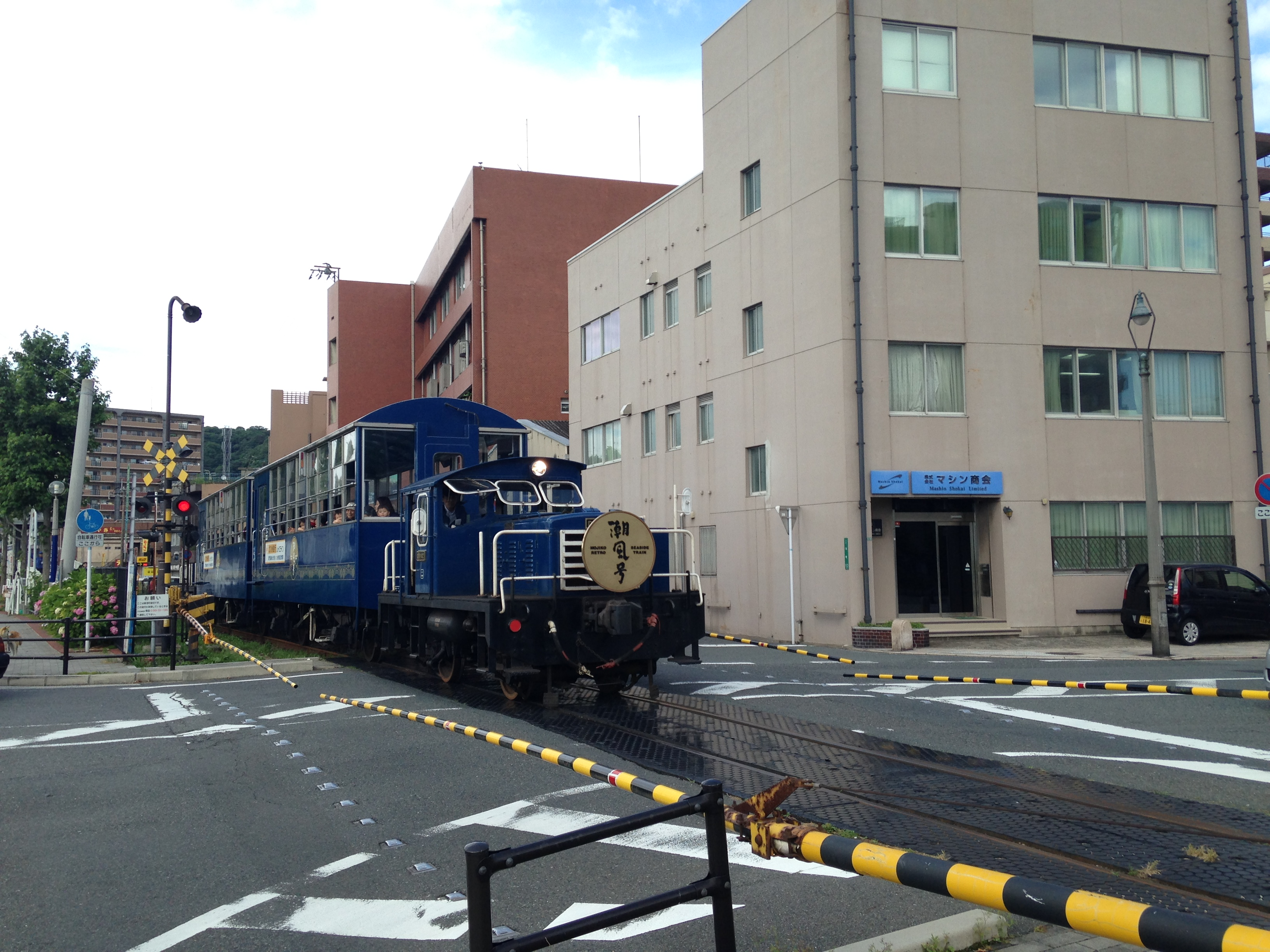 出光美術館駅南側の踏切を通るトロッコ列車「潮風号」